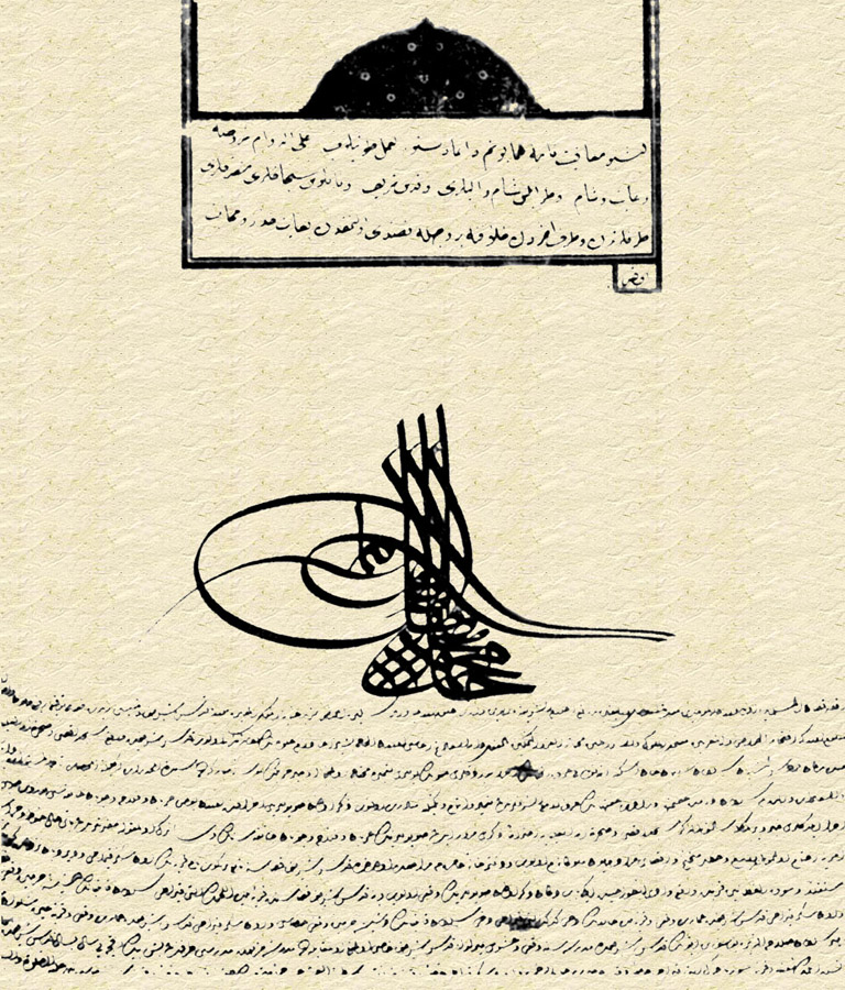 מסמך עות'מאני המעניק פטור מס לשומרים על אמת המים